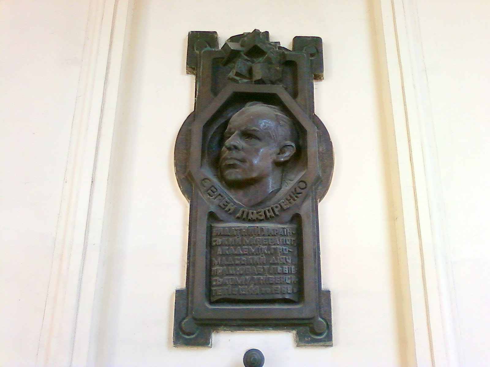 Евгений Константинович Лазаренко (1912-1979) - академик, ученый, доктор геолого-минералогических наук